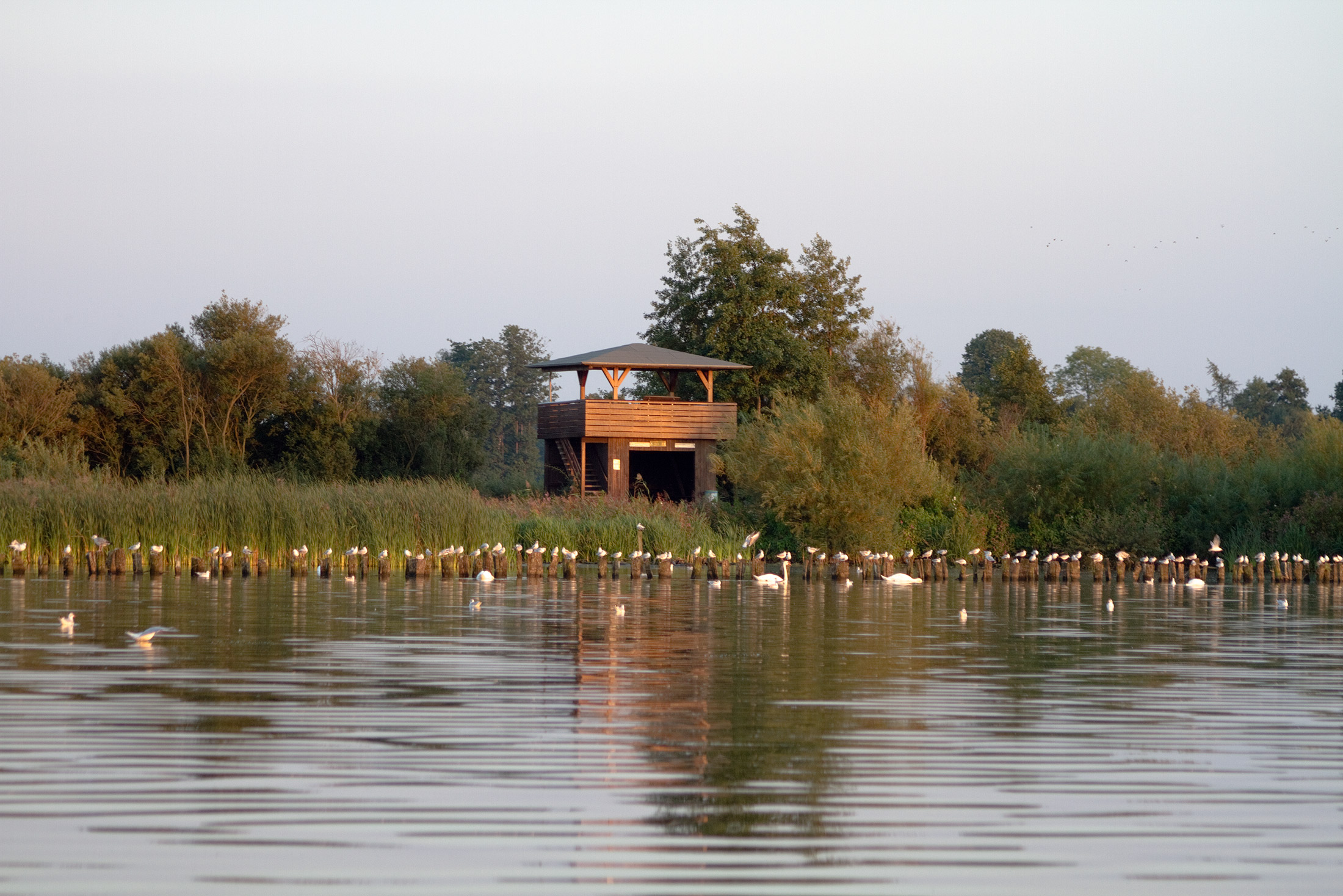 Die Schutzhütte mit Aussichtsplattform auf der "Hohen Sieben". Von hier aus lassen sich Flora und Fauna ungestört beobachten.